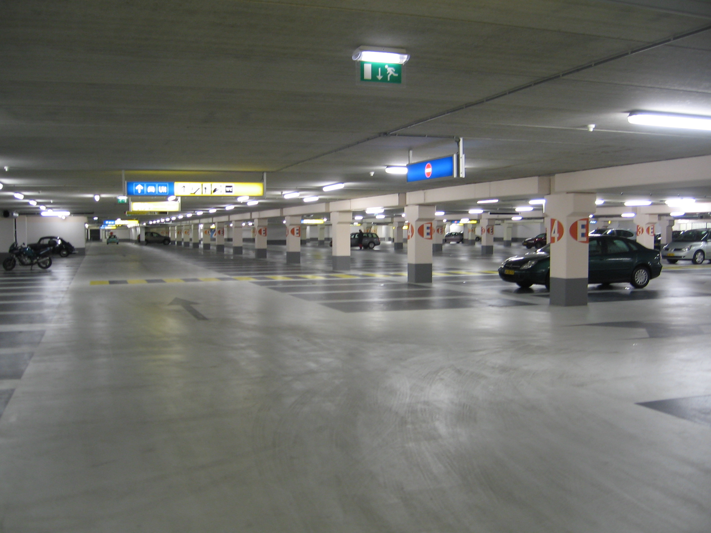 parkeergarage (binnenzijde), Delft